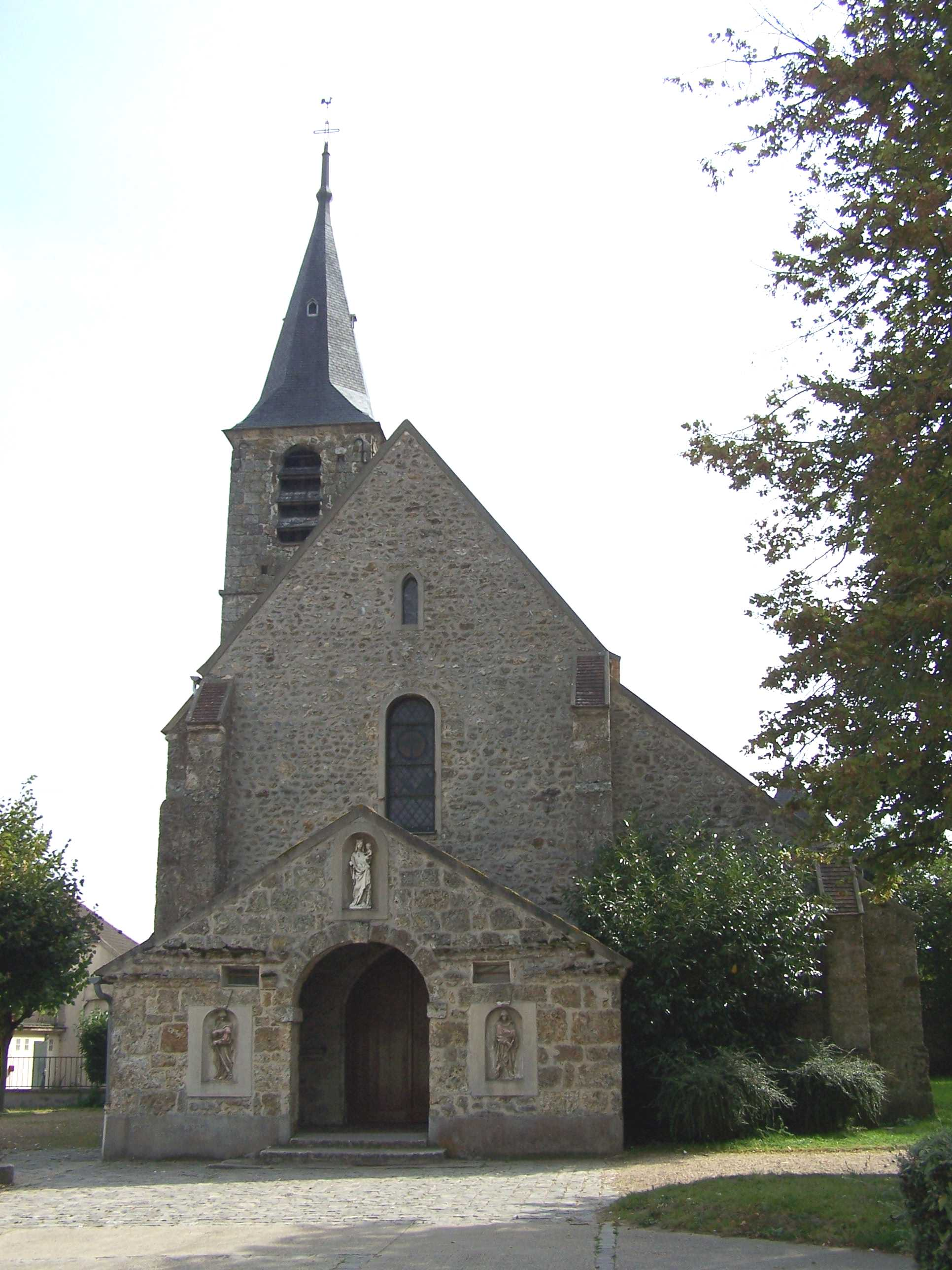 Église du Mesnil-Saint-Denis (Yvelines, France